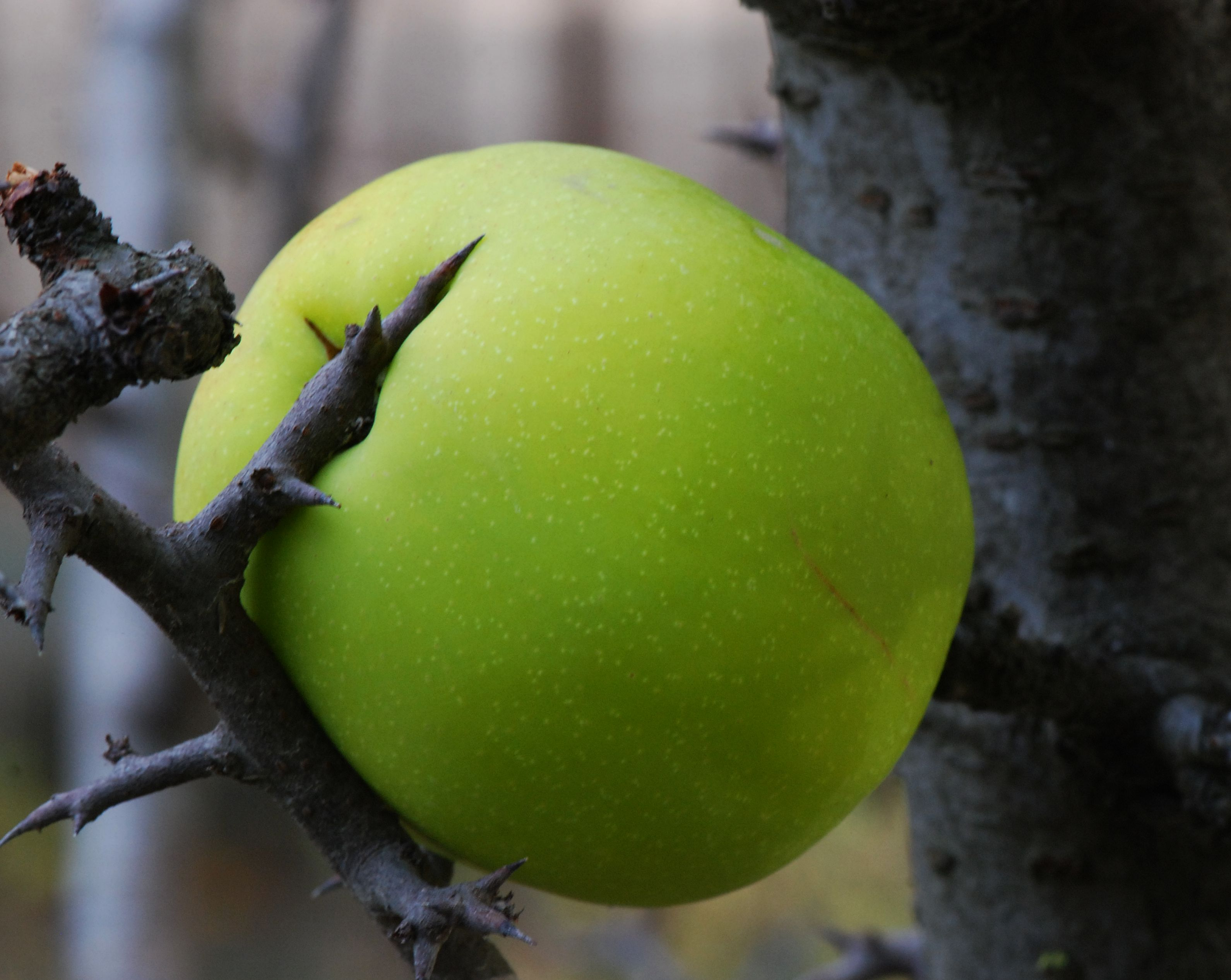 Chaenomeles cathayensis, fruit, Jardin des Plantes de Paris